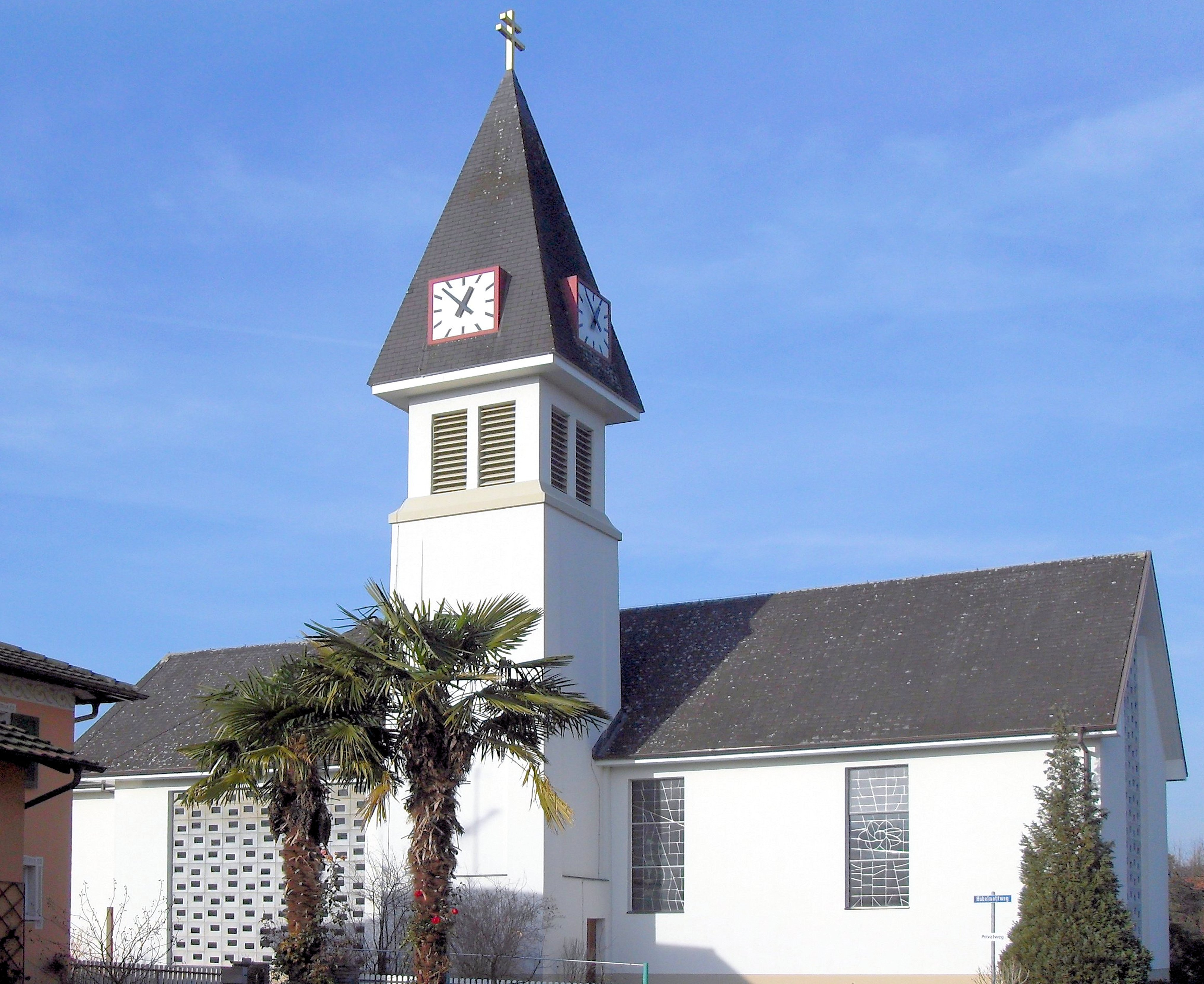 Katholische Kirche in Wallbach, Kanton Aargau, Schweiz